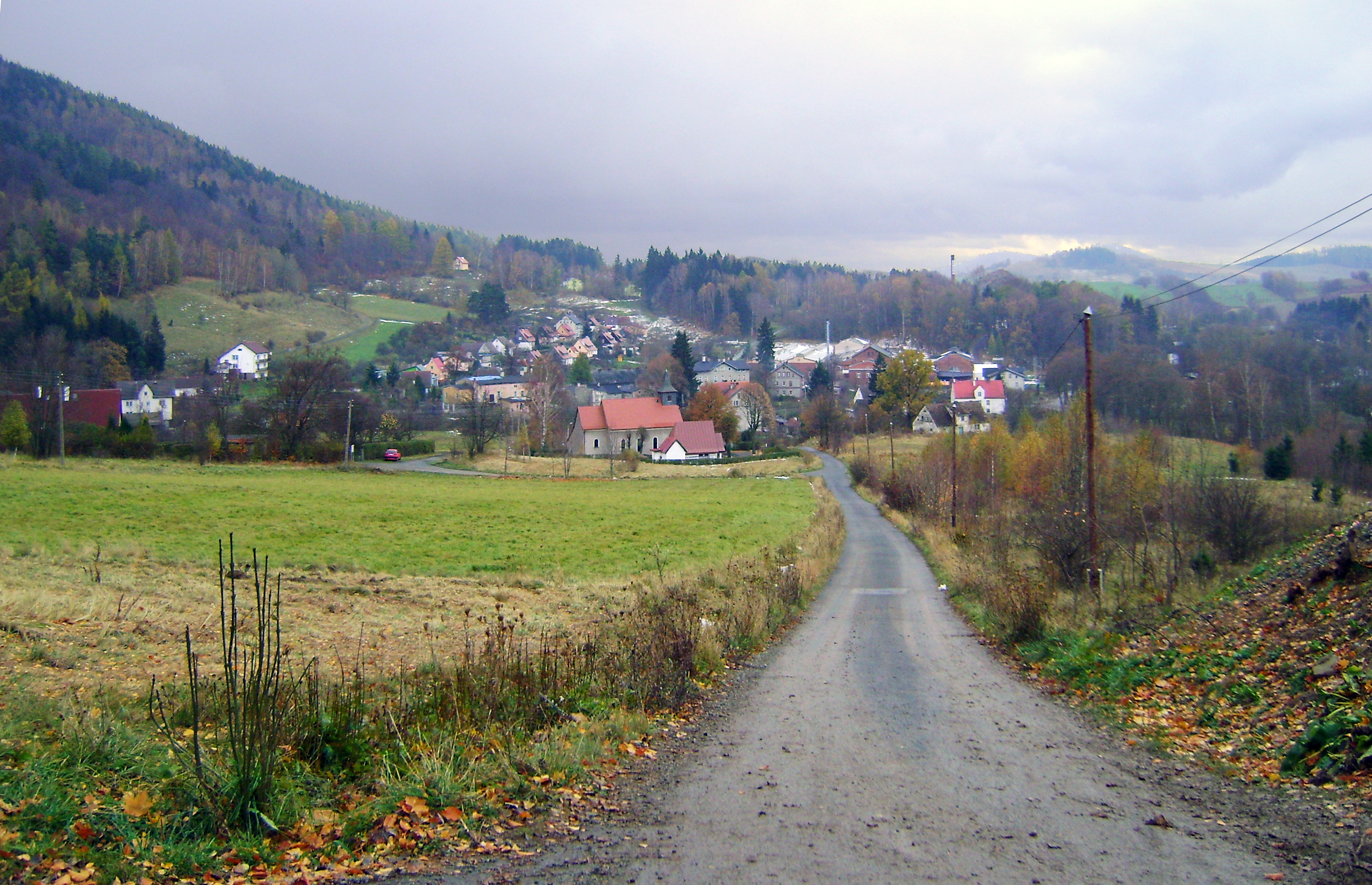 Przygórze - widok na wieś od strony północnej z południowo-wschodniego zbocza wzniesienia Lirnik